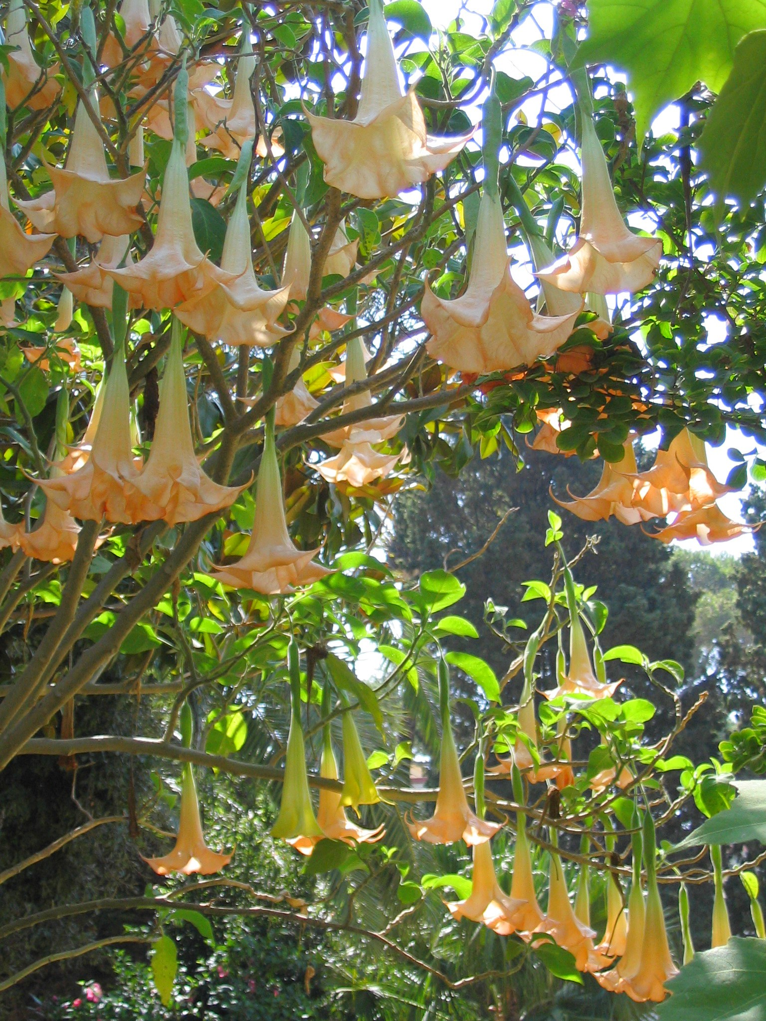 Calices tombants des fleurs de Daturas. Malaga, Espagne, Jardin de la cathédrale de l’annonciation. Espagne.